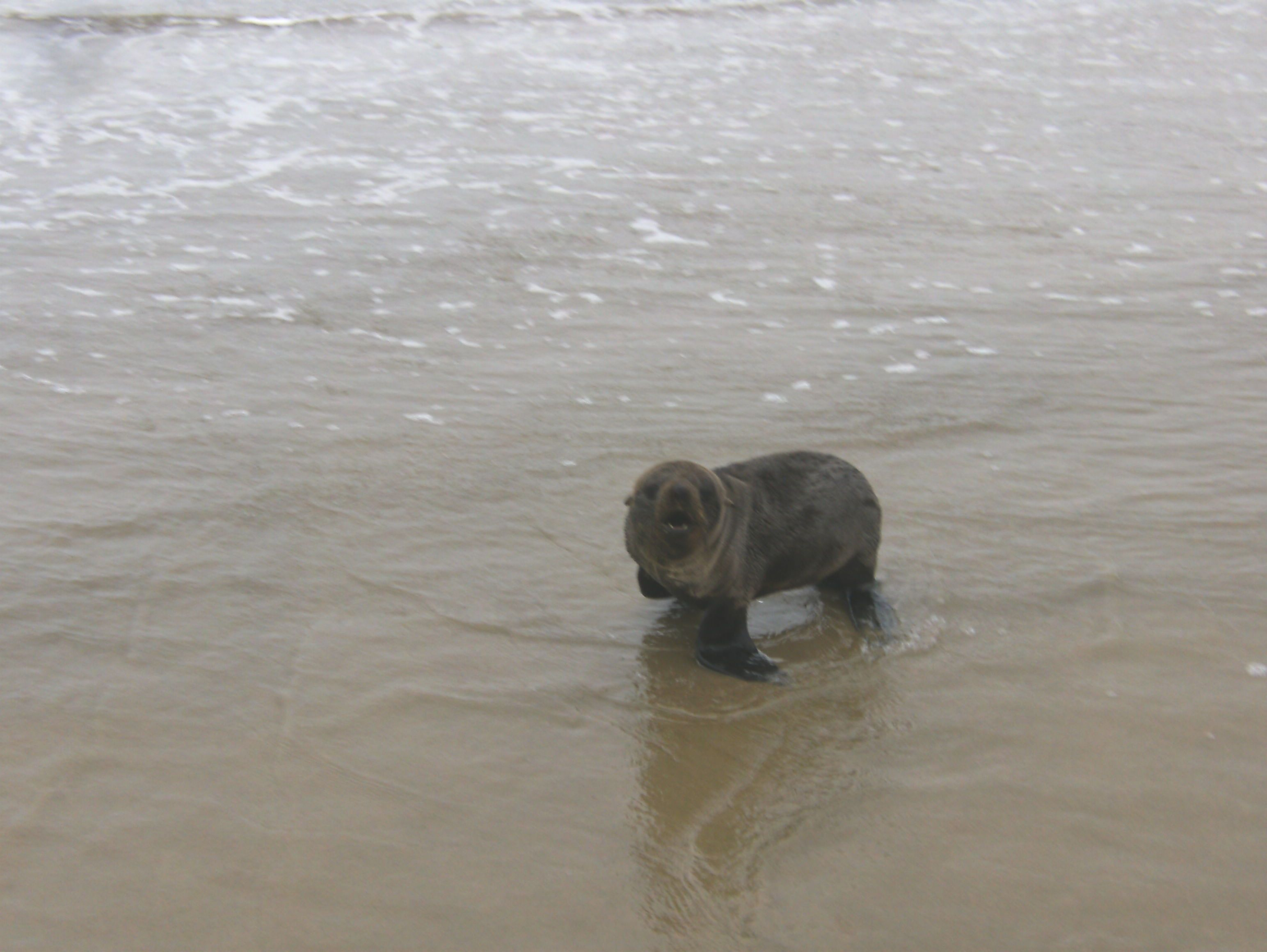 Filhote de Lobo Marinho, na beira do mar do Balneário Rincão